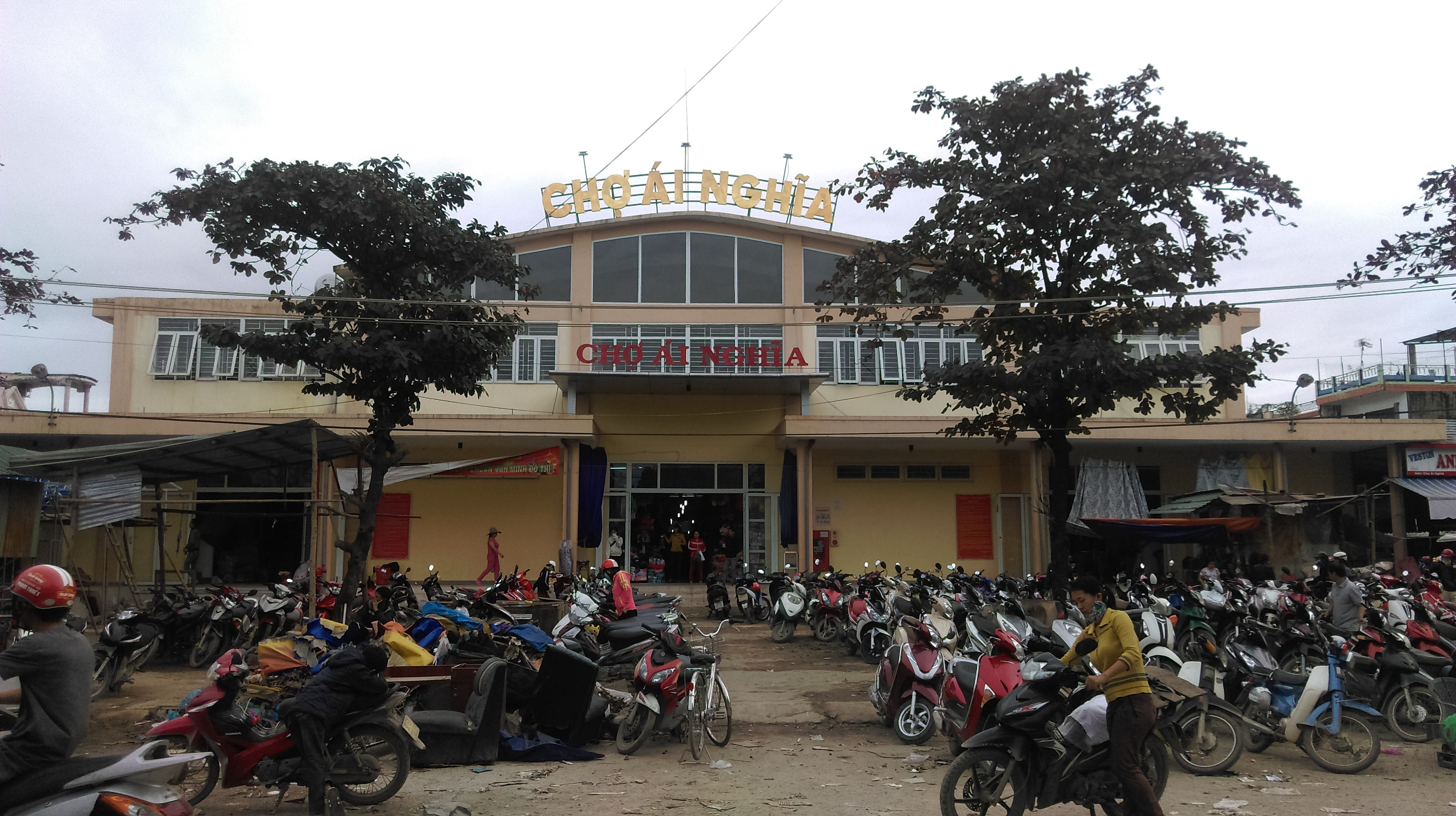 Chợ Ái Nghĩa, Đại Lộc, Quảng Nam